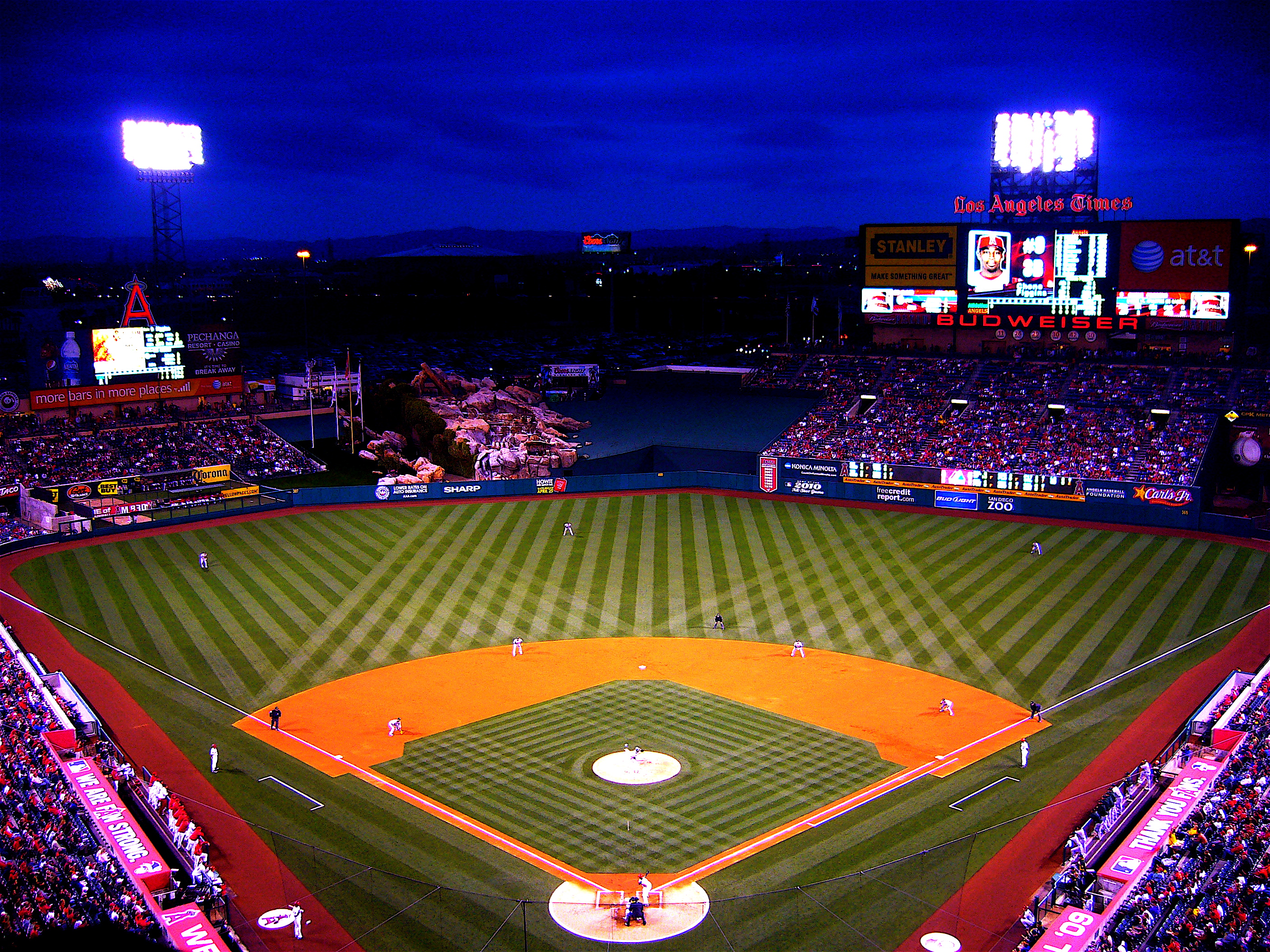 Angel Stadium of Anaheim in Anaheim, California, USA